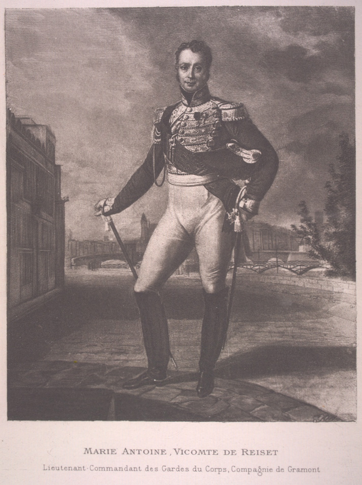 Marie Antoine de Reiset (1775-1836), lieutenant-commandant des gardes du corps, compagnie de Gramont